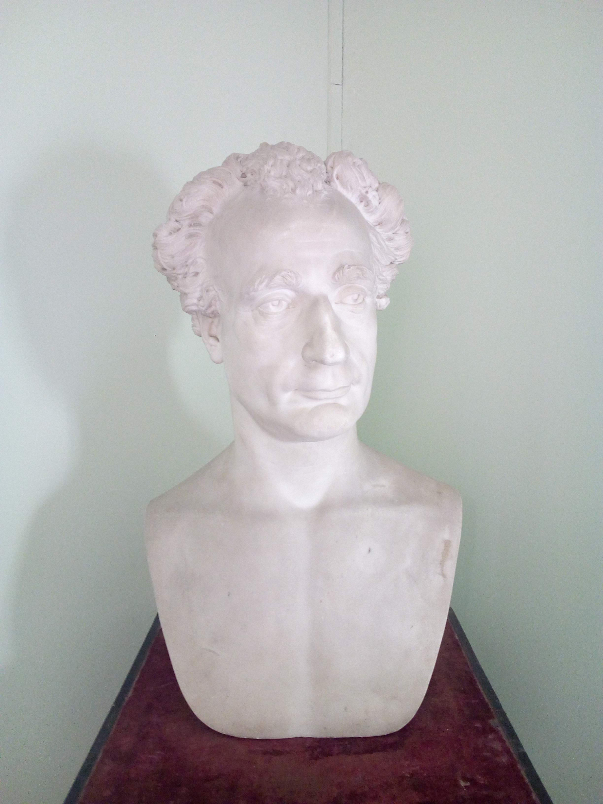 Cesare Rossi, attore italiano, 1829-1898